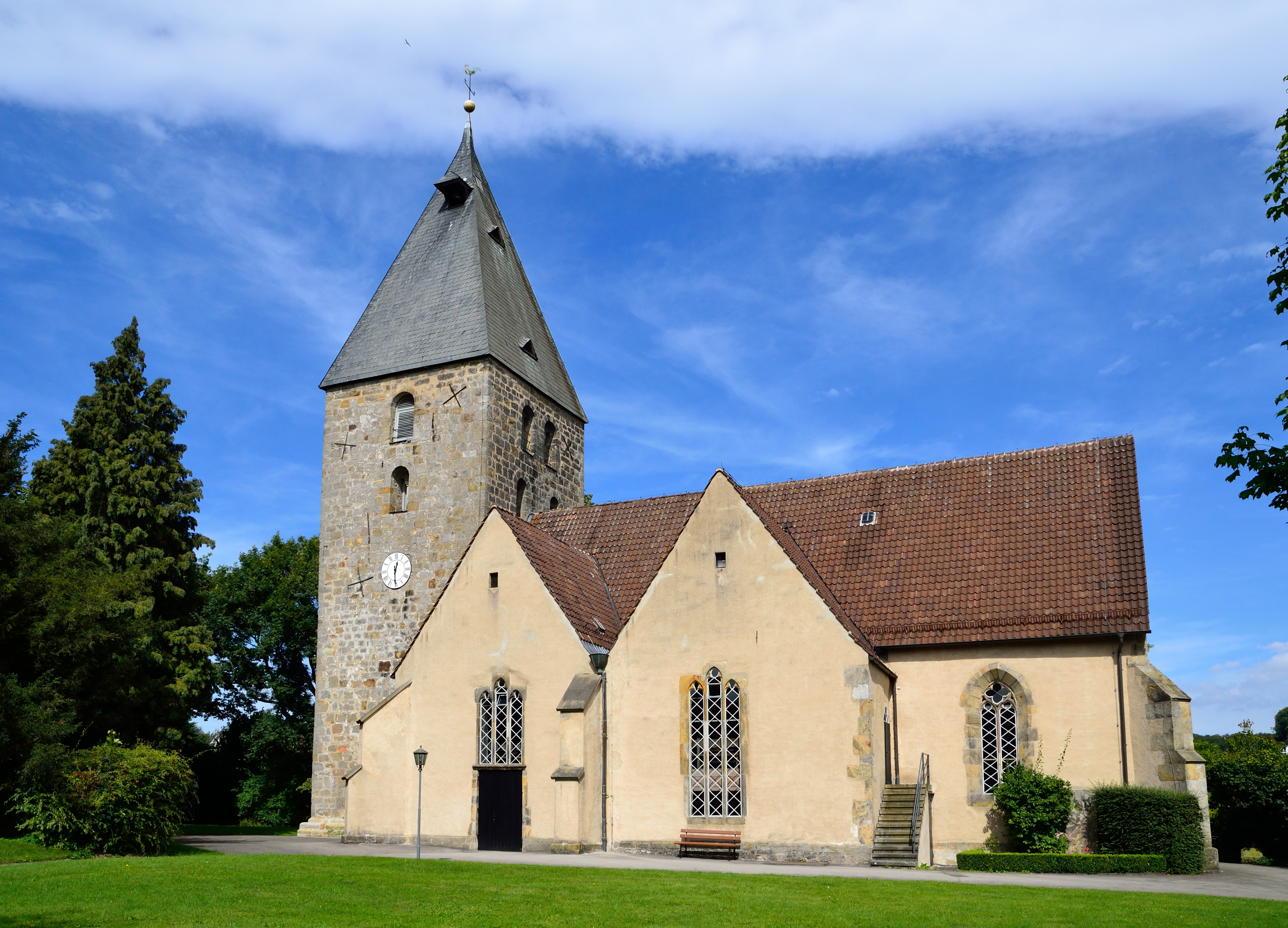 This is a photograph of an architectural monument. Evangelisch-reformierte Kirche Heiligenkirchen